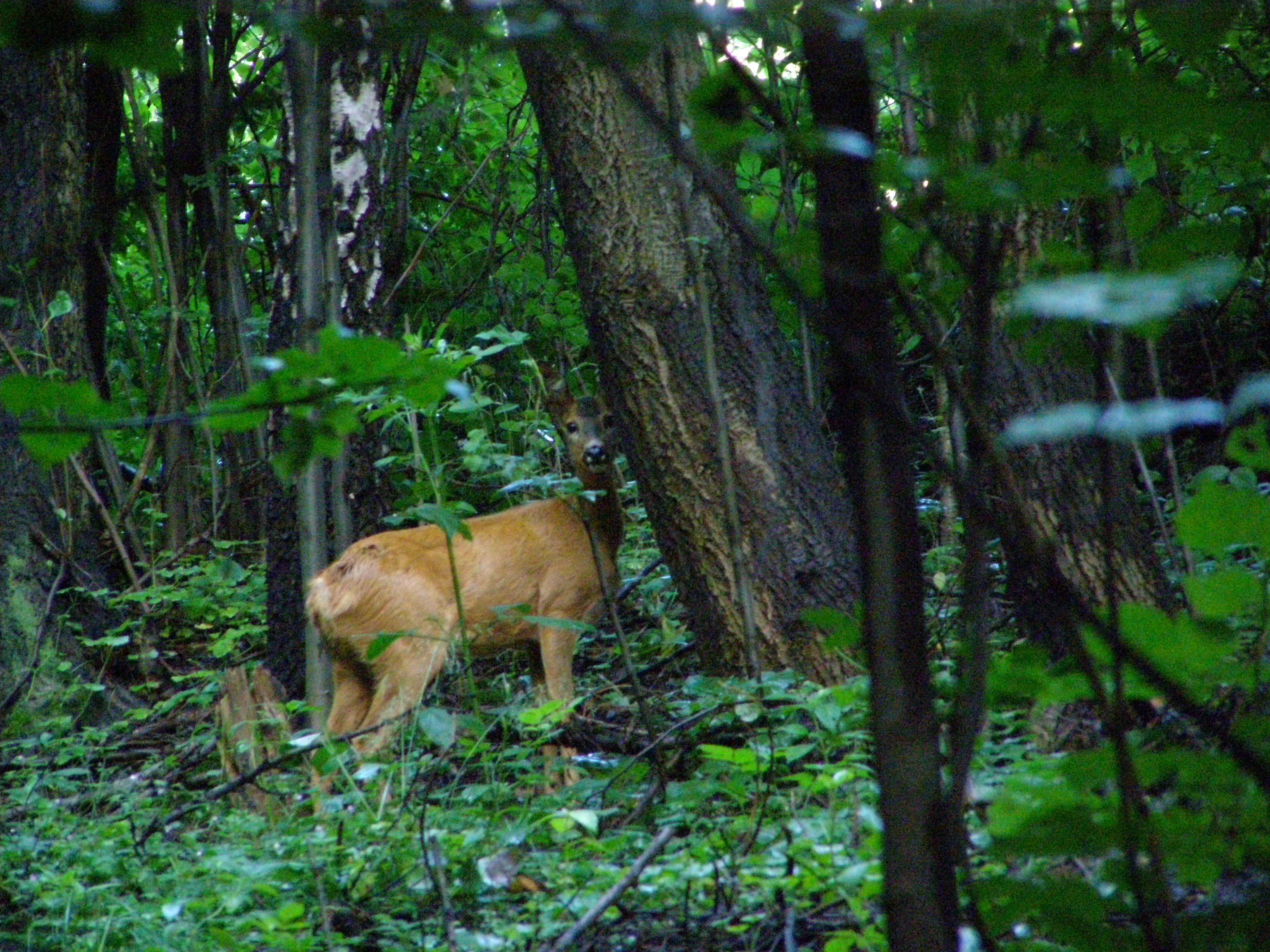 Srna v lese na úpatí Metylovické hůrky